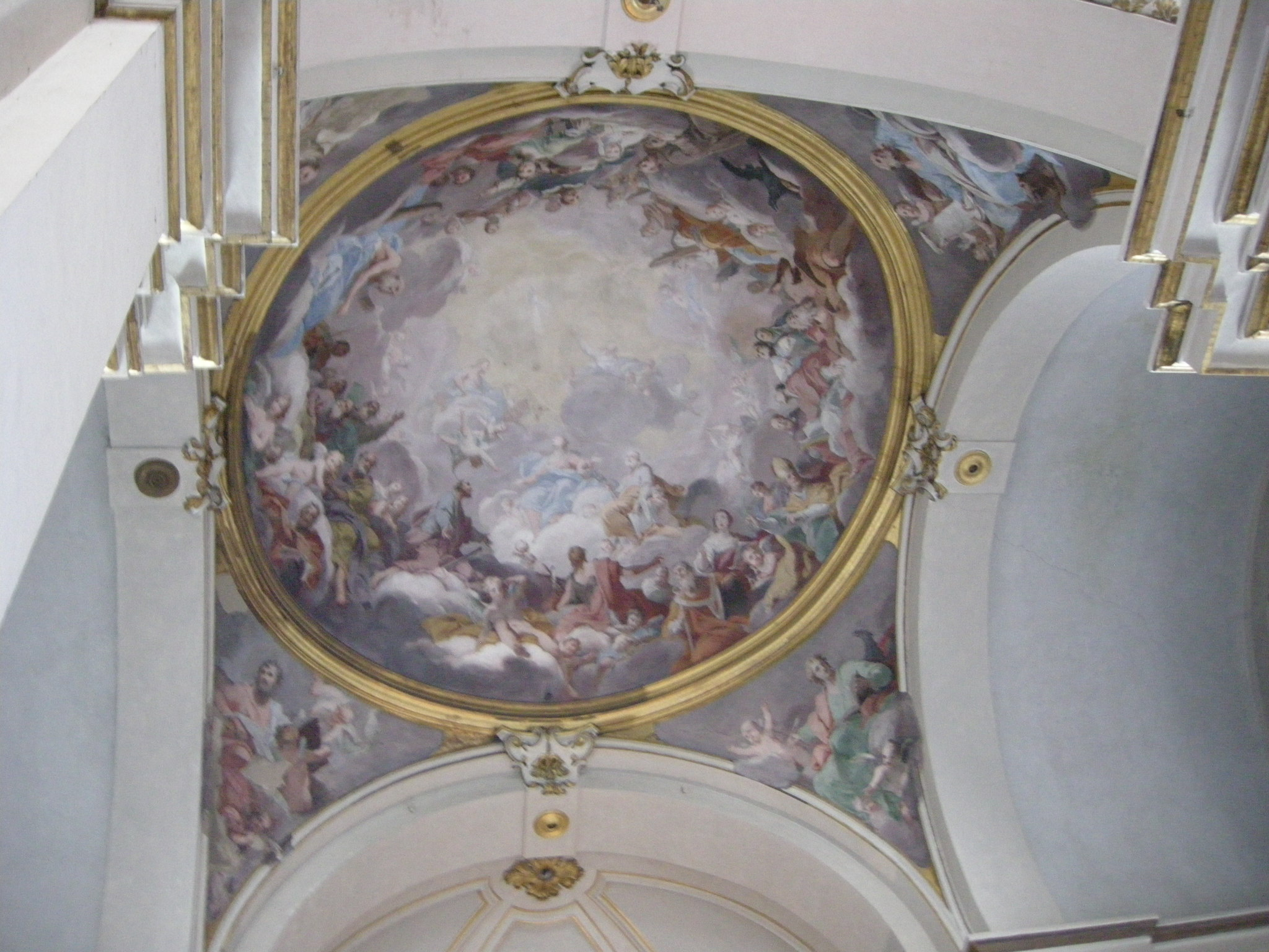 San Jacopo Soprarno, interno, cupola, affreschi di matteo bonechi